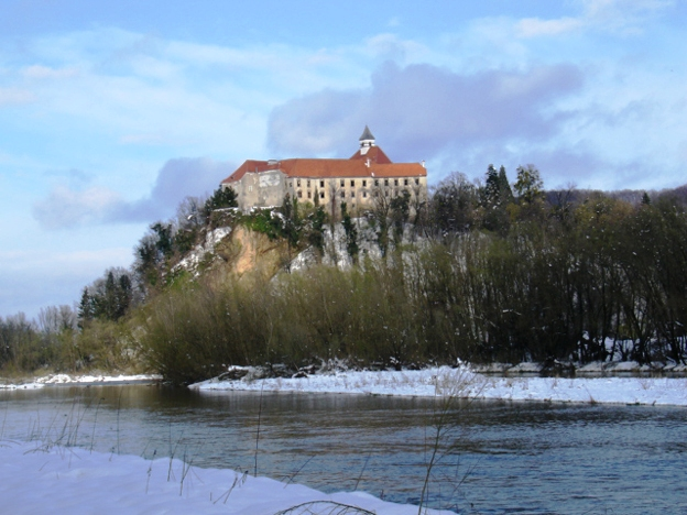 Grad Borl